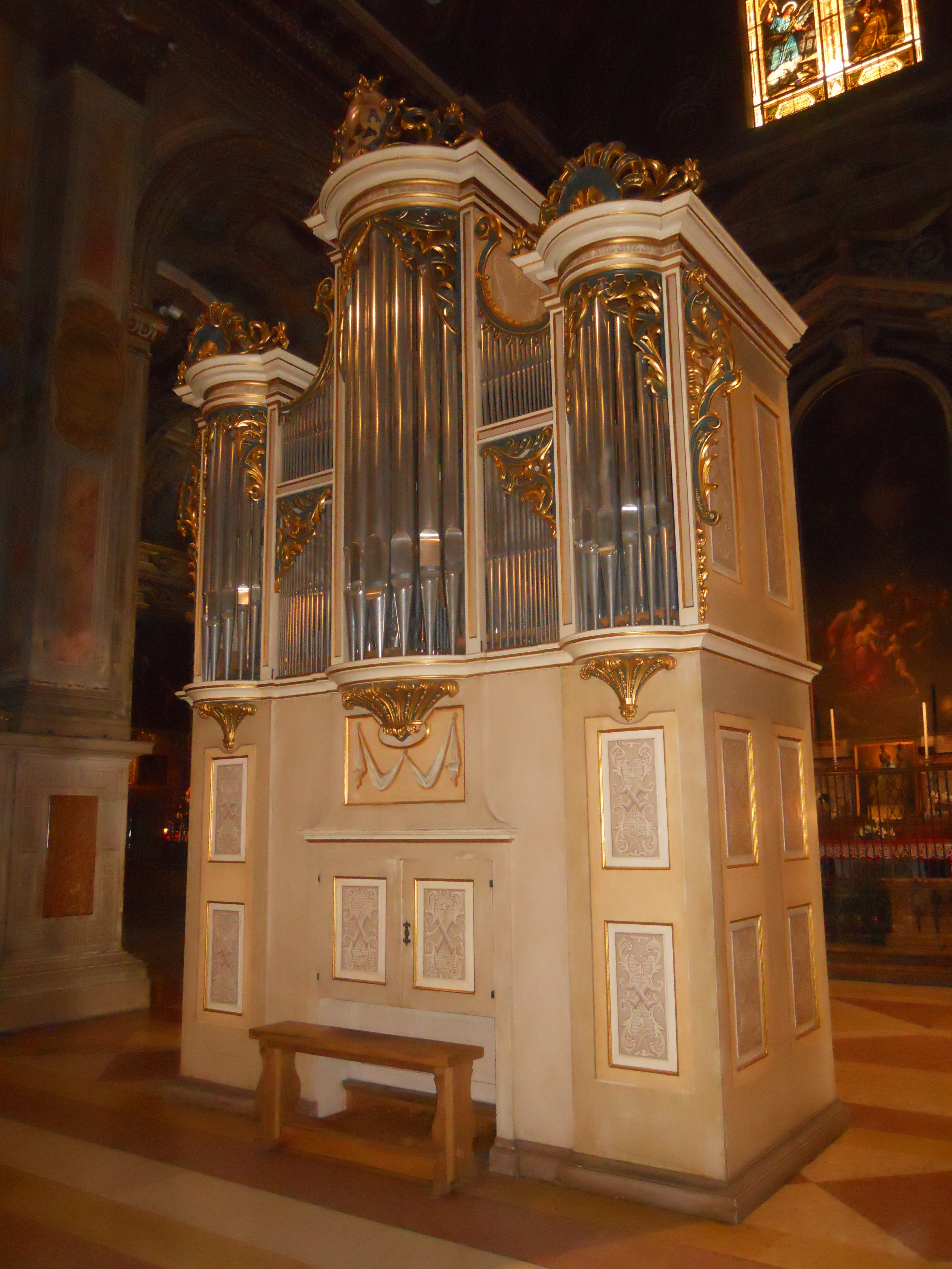 L'organo Dell'Orto & Lanzini della chiesa di Sant'Alessandro in Zebedia a Roma